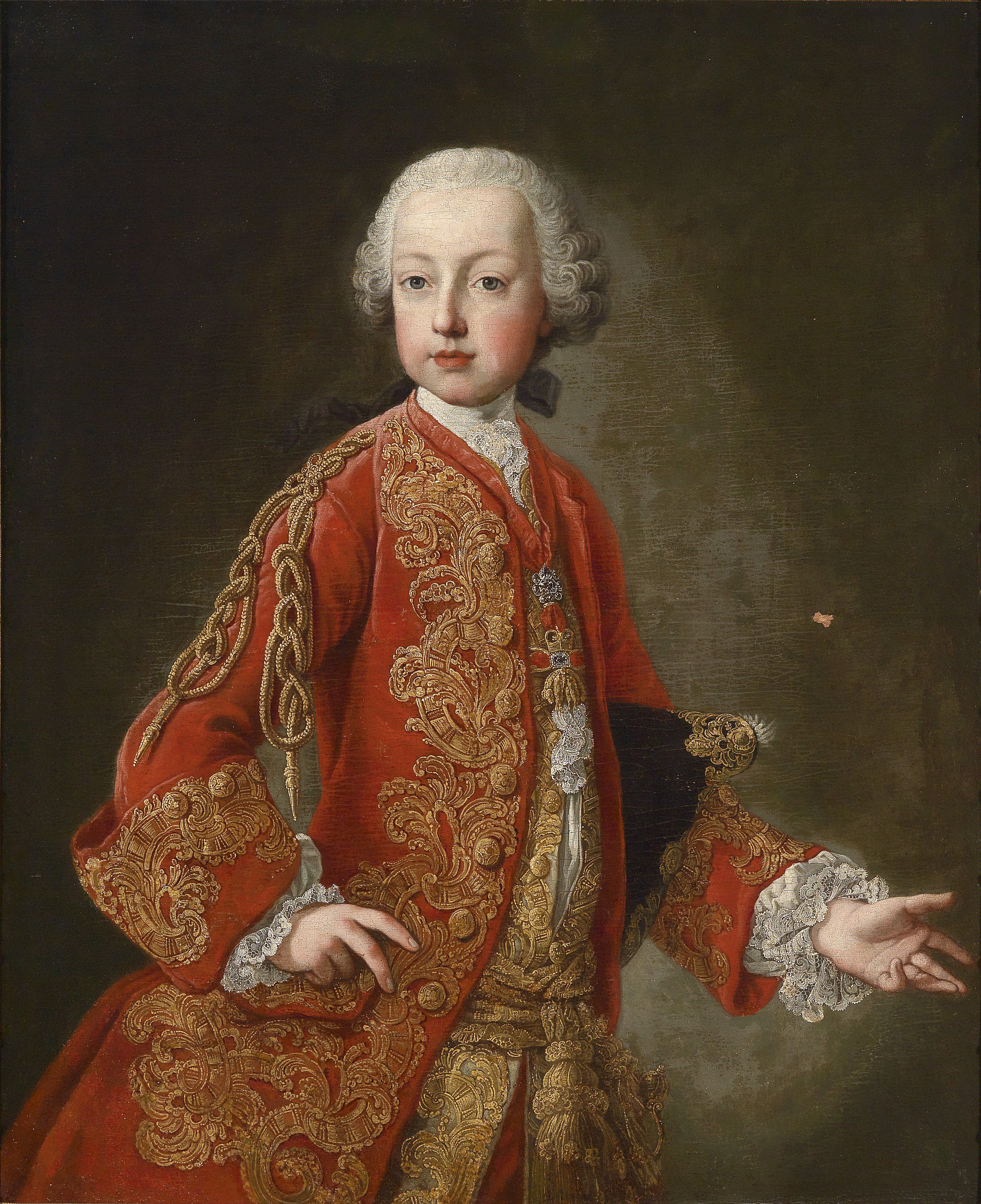 Bildnis Kaiser Joseph II. (1741-1790) als jugendlicher Erzherzog